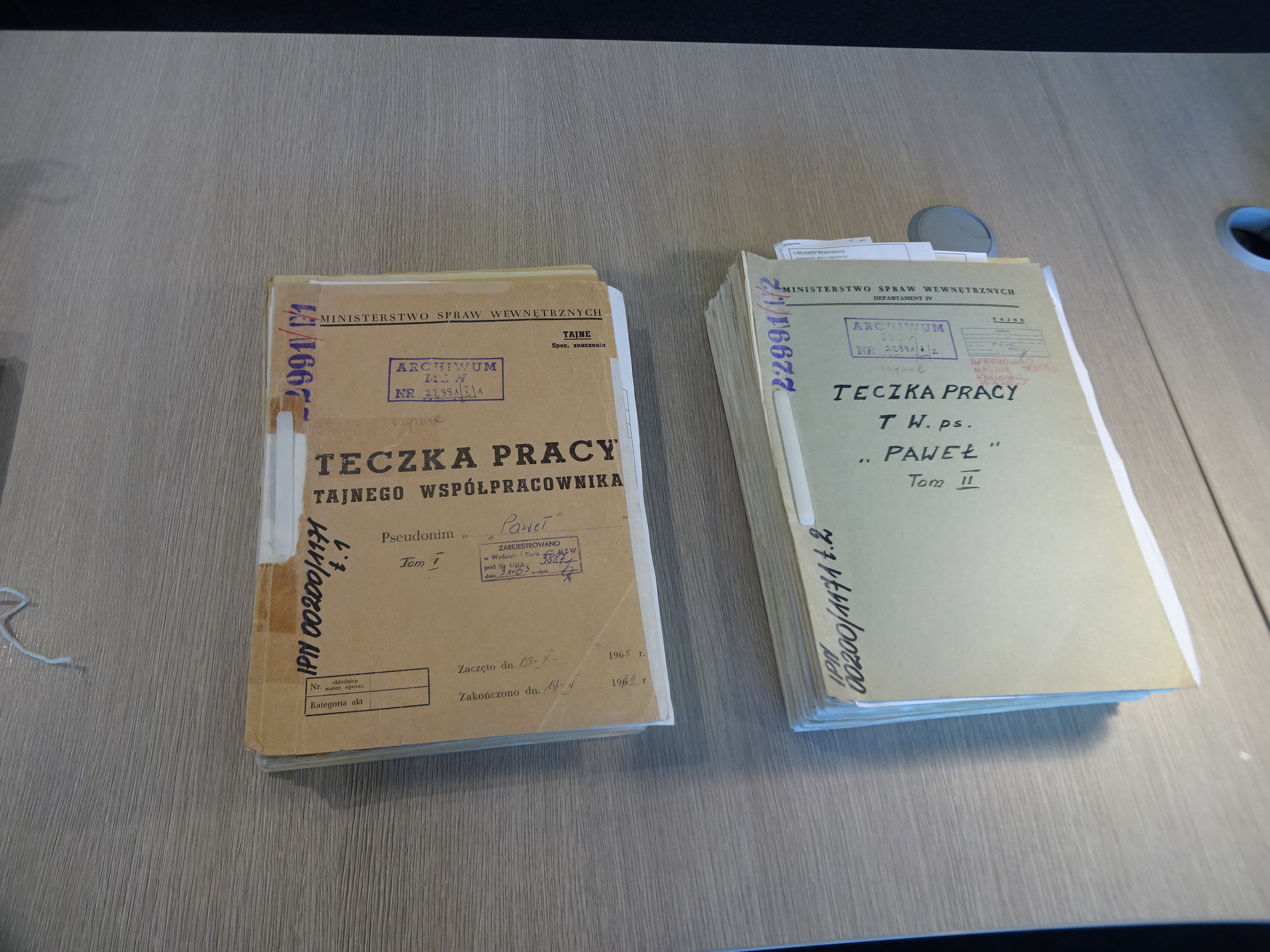 Zdzisław Pawlik (1928-2010), tajny współpracownik (TW) "Paweł"